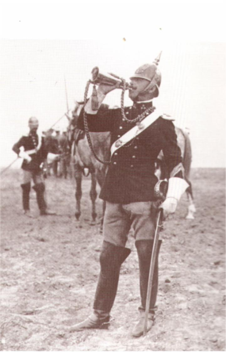 Leibgardereiter (Hornist)